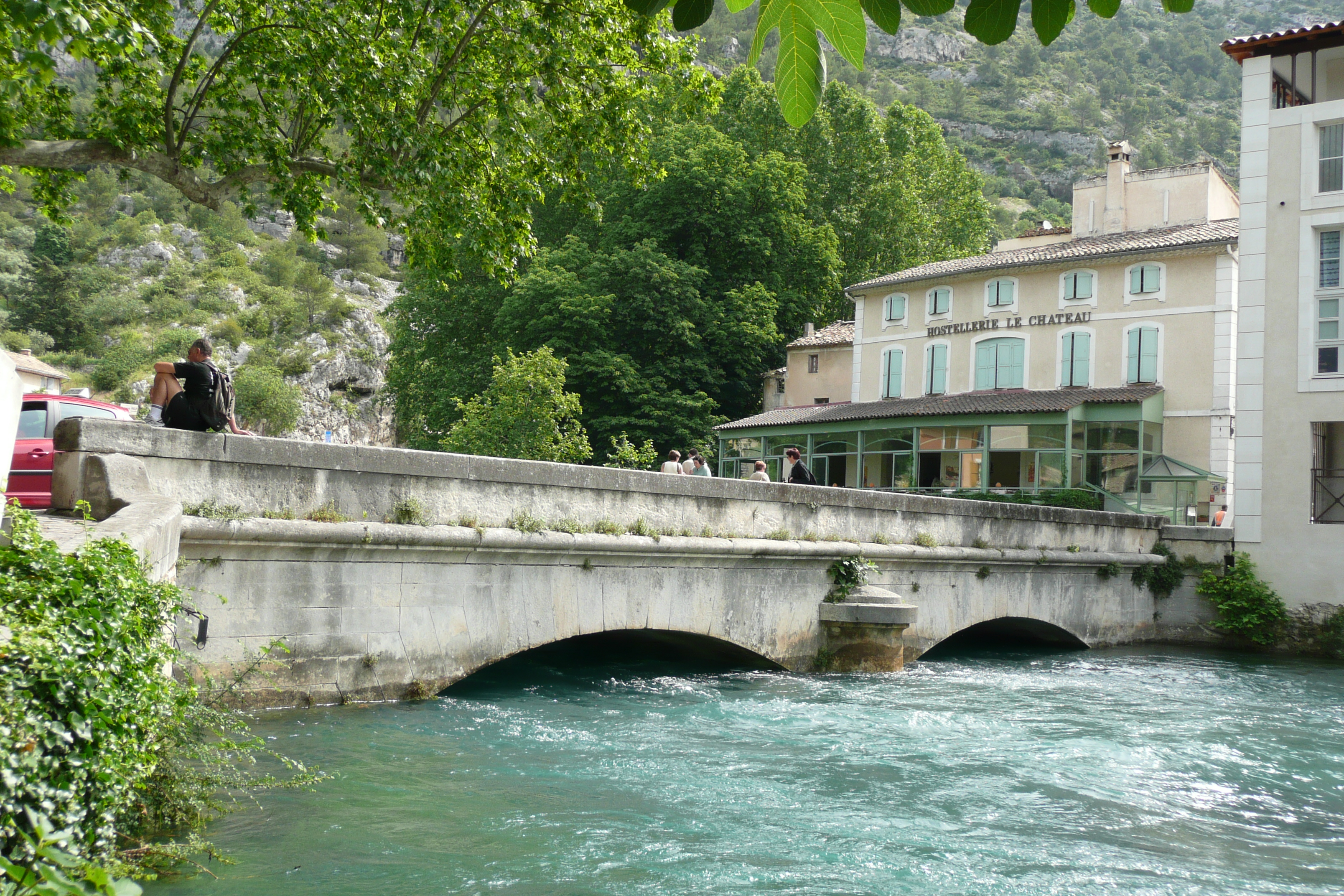 La Sorgue le 31 mai 2008 avec 1,53 mètres de hauteur, La Fontaine de Vaucluse.